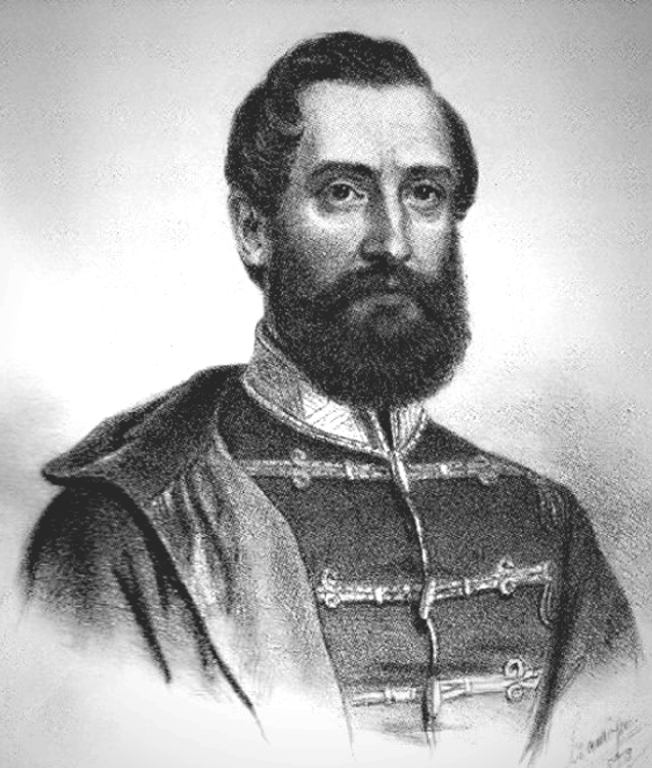 Lázár Vilmos honvéd ezredes, aradi vértanú (litográfia)